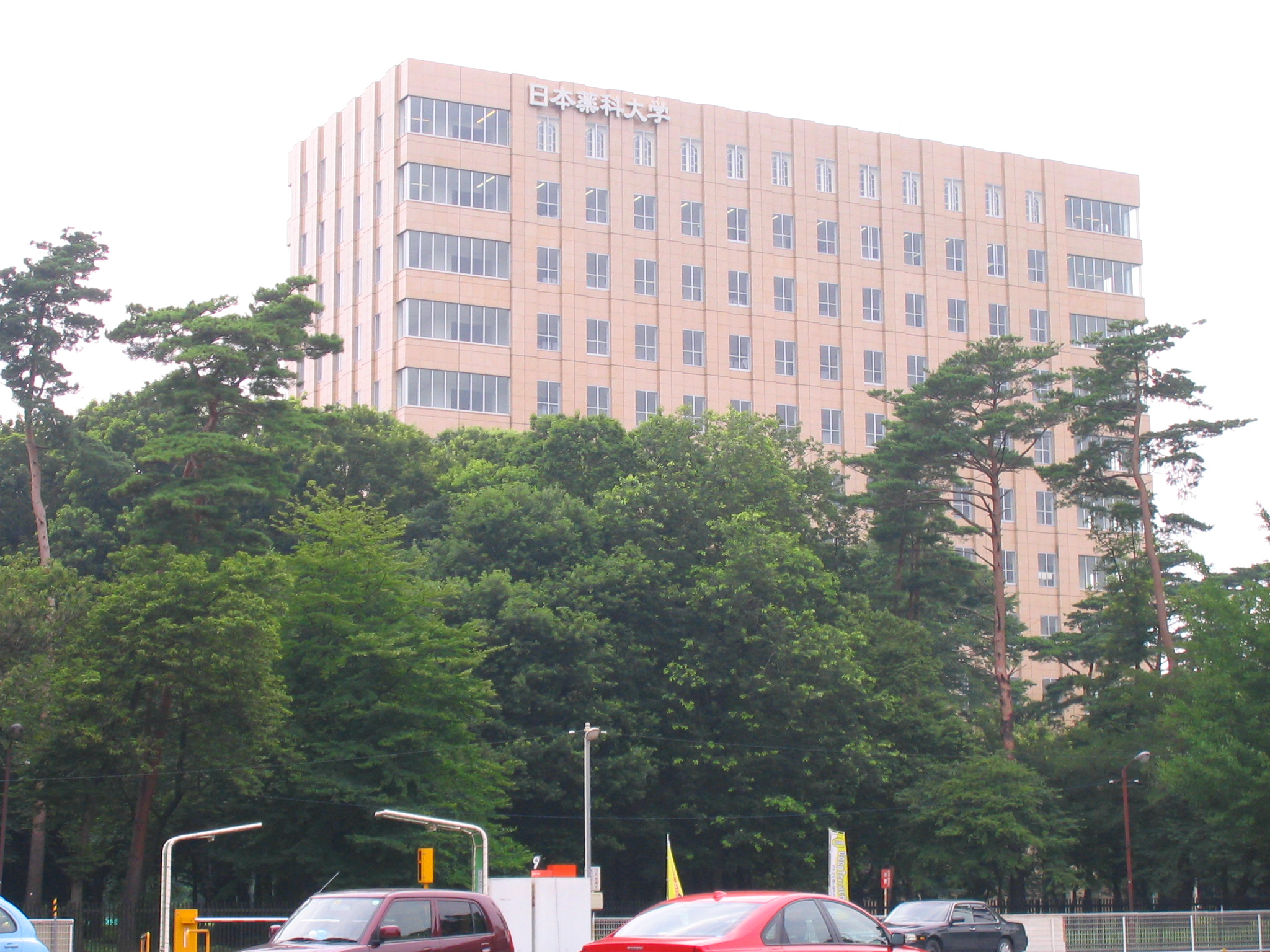 日本薬科大学